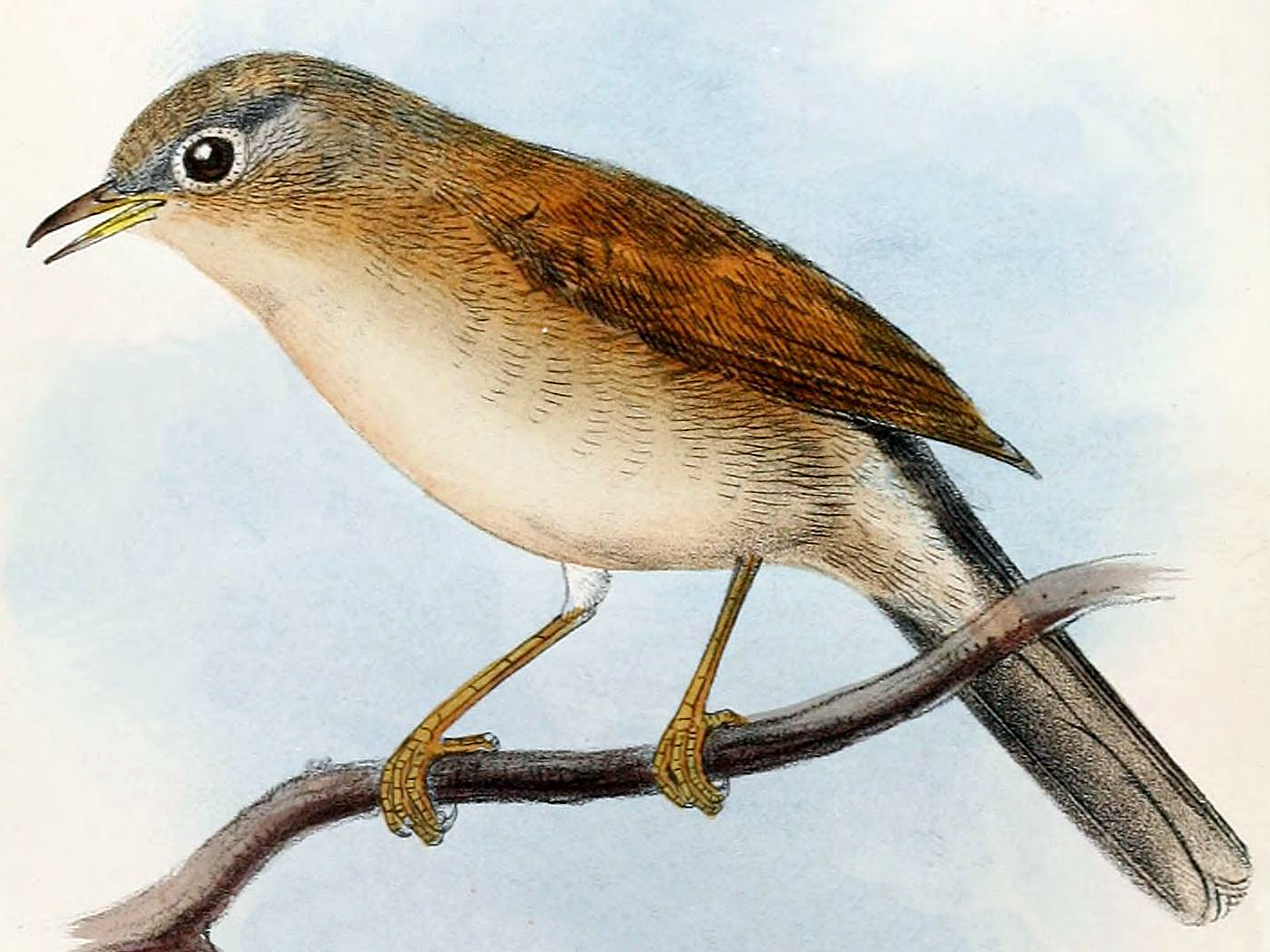 Sylvia deserticola, Tristram's Warbler